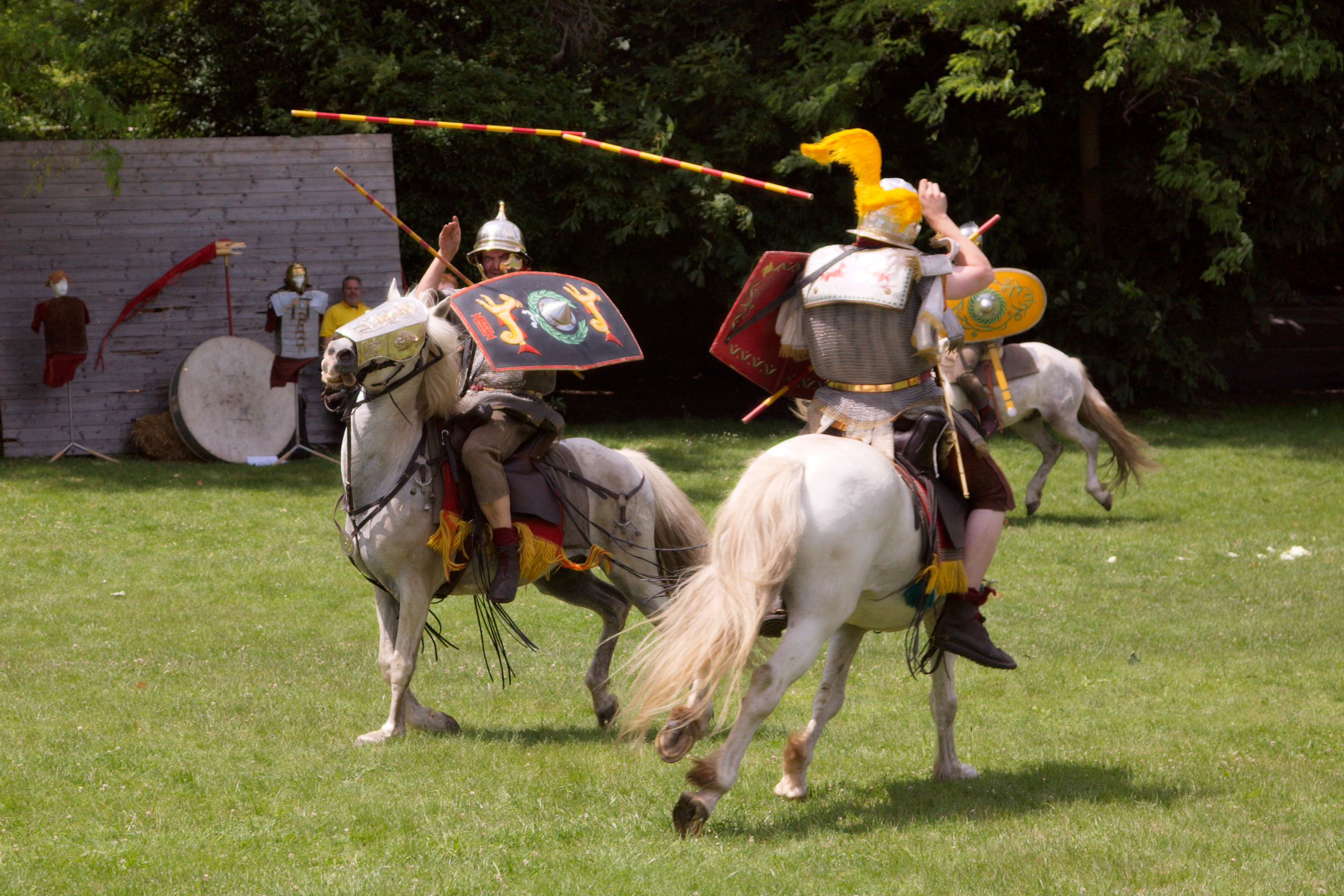 Reiterkampf mit Wurfspießen. Vorführung in Carnuntum . Show of